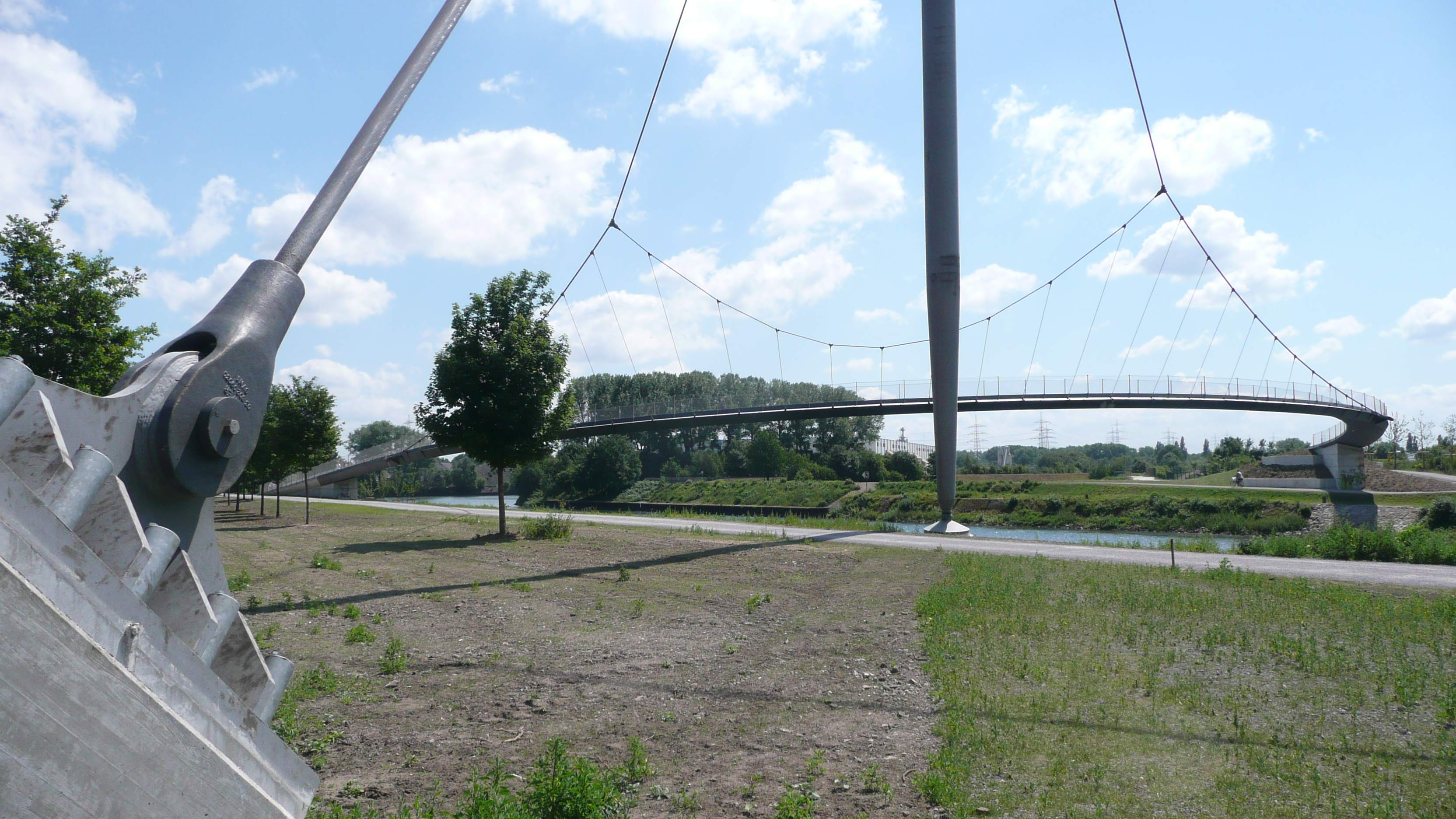 Grimberg-Brücke